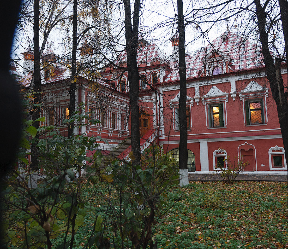 пер.Большой Харитоньевский,21: дворец князей Юсуповых; 16.10.2011